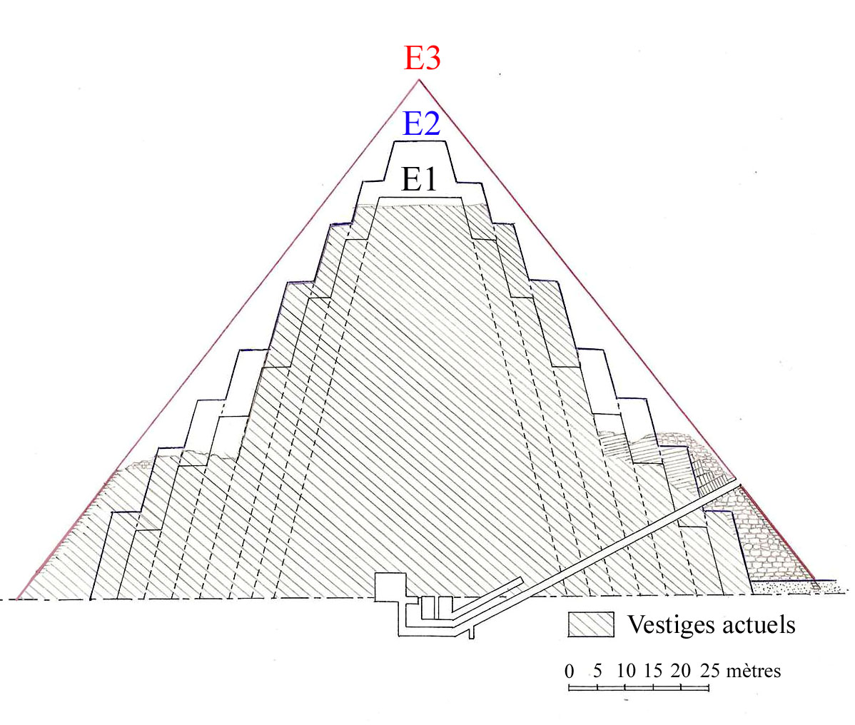 Coupe Sud-Nord de la pyramide de Meïdoum